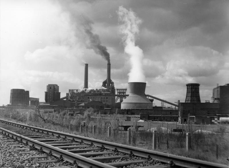 Schachtanlage Rheinpreussen 5 Utfort/Moers seit 1890, Täglich 4250 Tonnen.